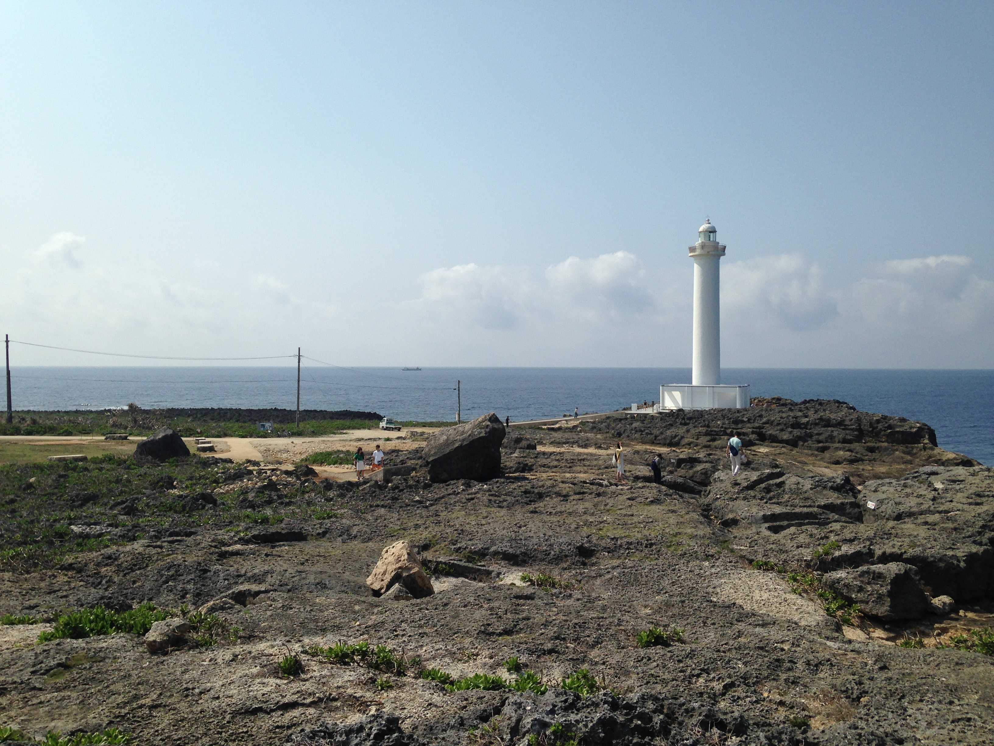 残波岬に立つ残波岬灯台